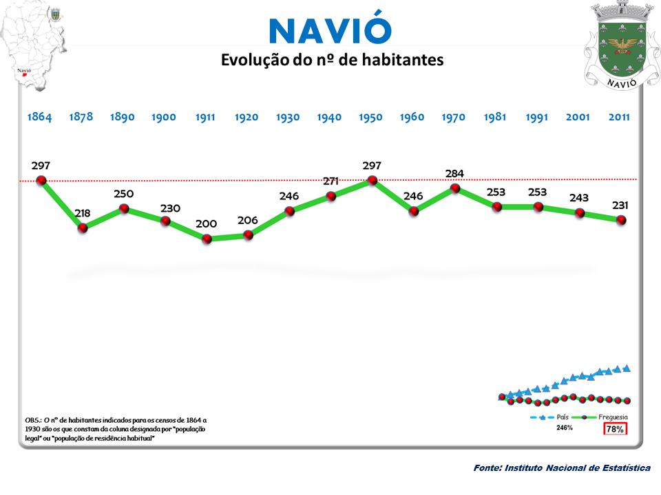 Cenos 1864/2011